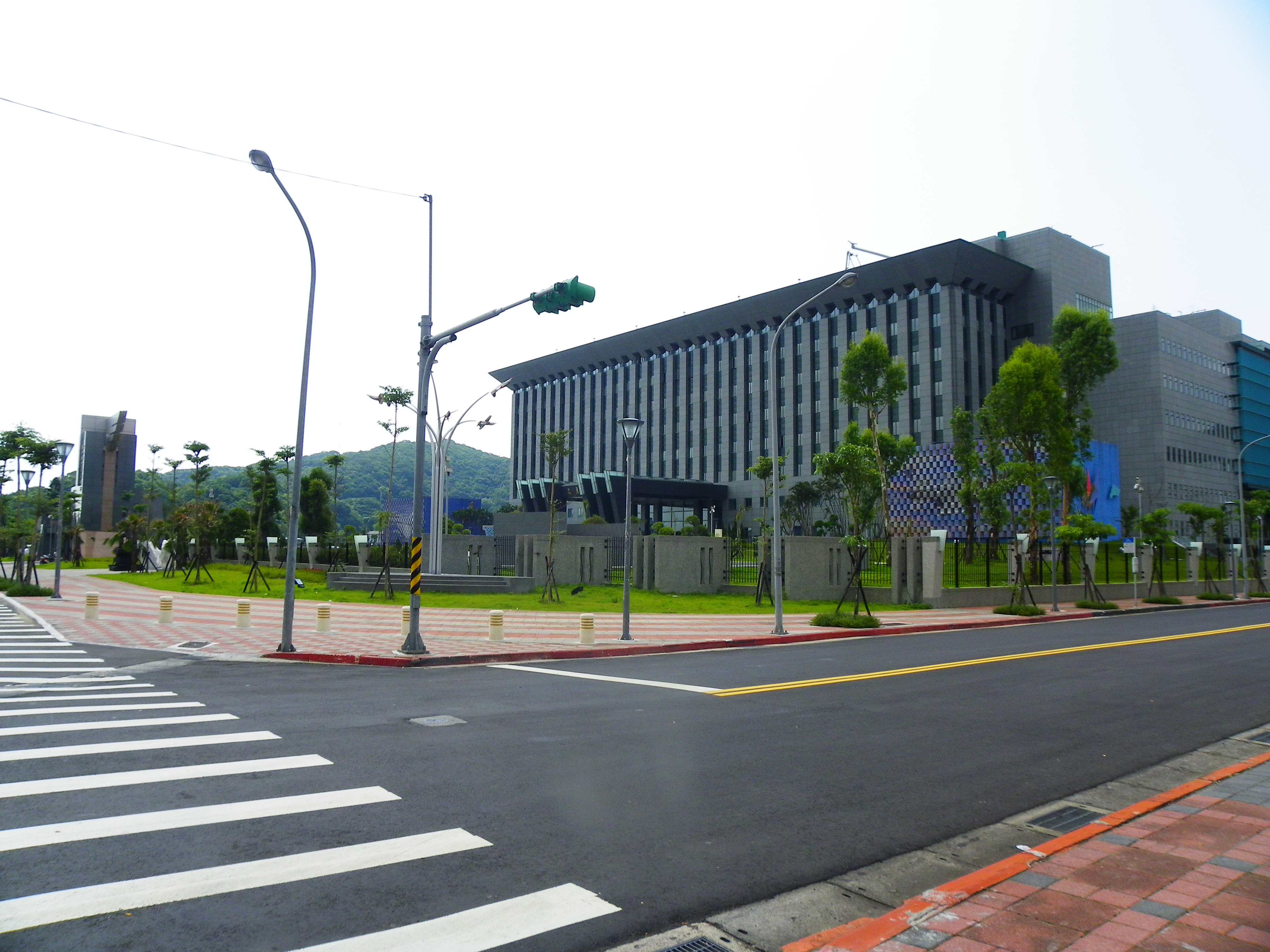 臺北市中山區大直中華民國國防部空軍司令部（忠勇營區，臺北市中山區北安路387號）東南遠景，2012年10月5日啟用。